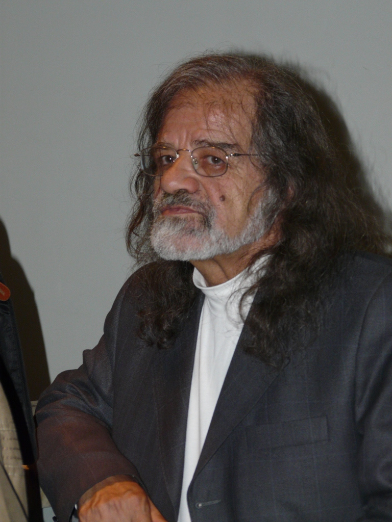 Jalal Zolfonon Iranian late musician